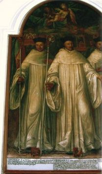 Berthold von Urach (links) auf einem Gemälde in der Äbtegalerie im Kreuzgang von Salem. Sein Wappen auf dem Bild, das gelbe Horn auf rotem Grund, ist falsch, wie der Heraldiker und Thennenbach-Forscher Ludwig Köllhofer herausfand. Denn das Bild zeigt das Wappen der Württembergischen Linie der Grafen von Urach.